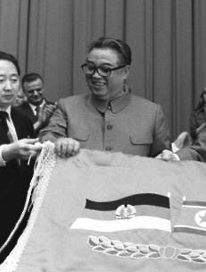 Title: Berlin, Besuch Kim II Sung in der DDR People in the image: Honecker, Erich (Staatsratsvorsitzender, Generalsekretär des ZK der SED), DDR (GND 118553399) * Kim Il Sung (Staatsoberhaupt), DVR Korea (GND 118562126) Factual corrections and alternative descriptions are encouraged separately from the original description. Additionally errors can be reported at this page to inform the Bundesarchiv. Original historic description: ADN-ZB / Mittelstädt / 1.6.84 / Berlin: Kim II Sung Besuch Ein Freundschaftsbanner überreichte der Generalsekretär des ZK der Pdak und Präsident der KDVR, Kim II Sung (2.v.l.), an Erich Honecker, Generalsekretär des ZK der SED und Vorsitzender des Staatsrates der DDR, auf der Kundgebung im Palast der Republik. 1984